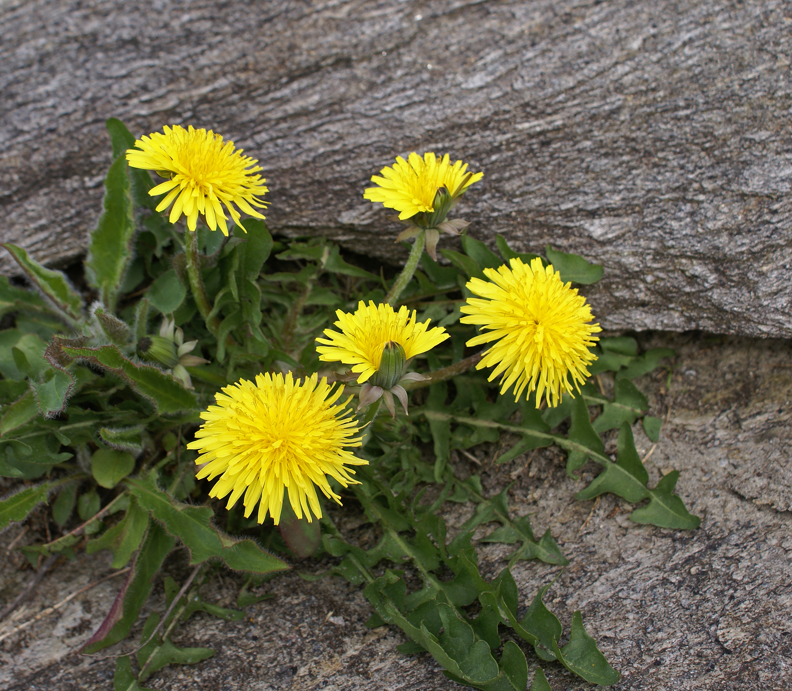 Dandelion - Løvetann - Taraxacum